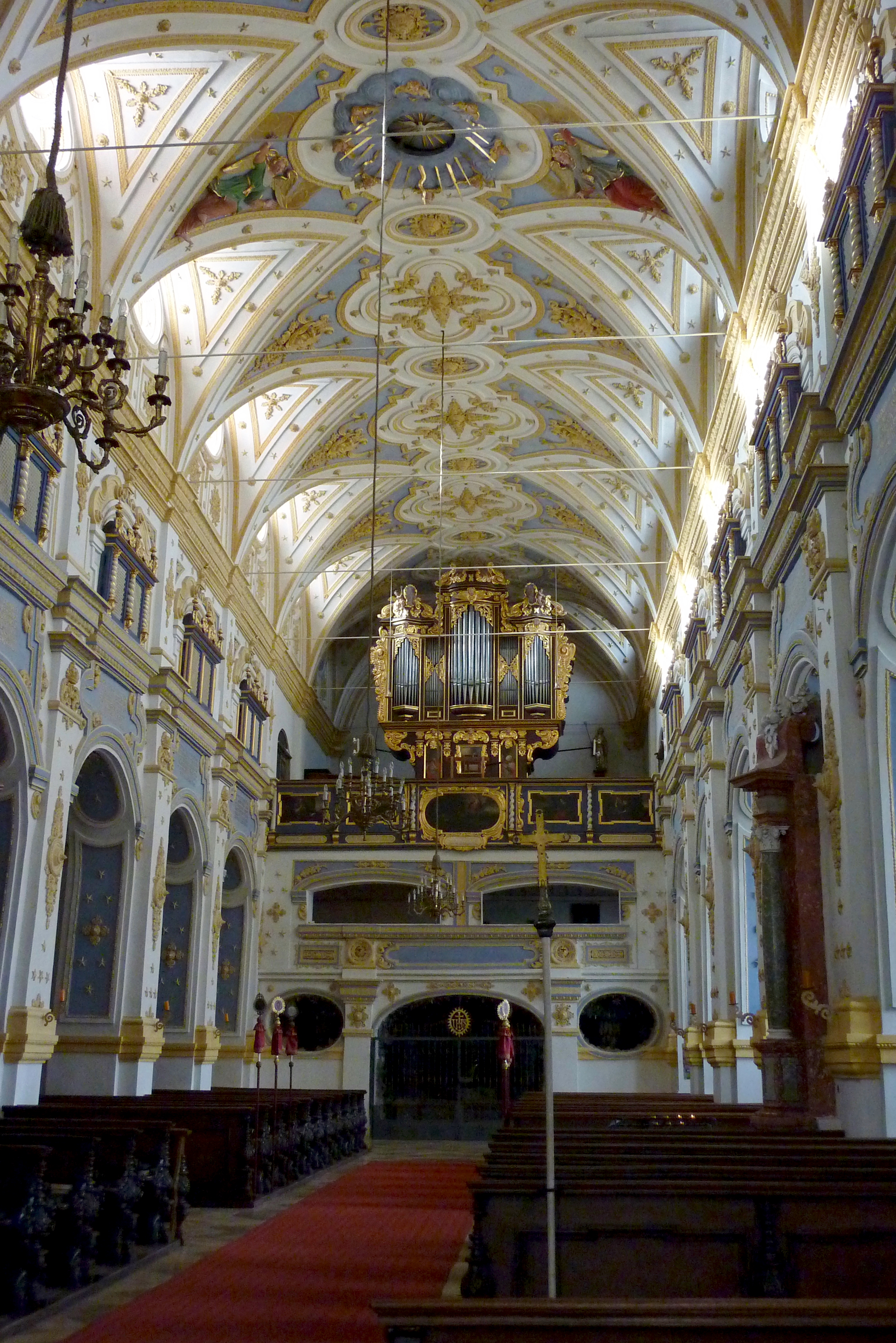 Katholische Pfarrkirche Mariä Himmelfahrt, ehemalige Klosterkirche des Zisterzienserinnenklosters Niederschönenfeld im Landkreis Donau-Ries (Bayern), von 1659 bis 1662 Wiederaufbau durch Konstantin Pader, Innenraum mit Blick zur Empore